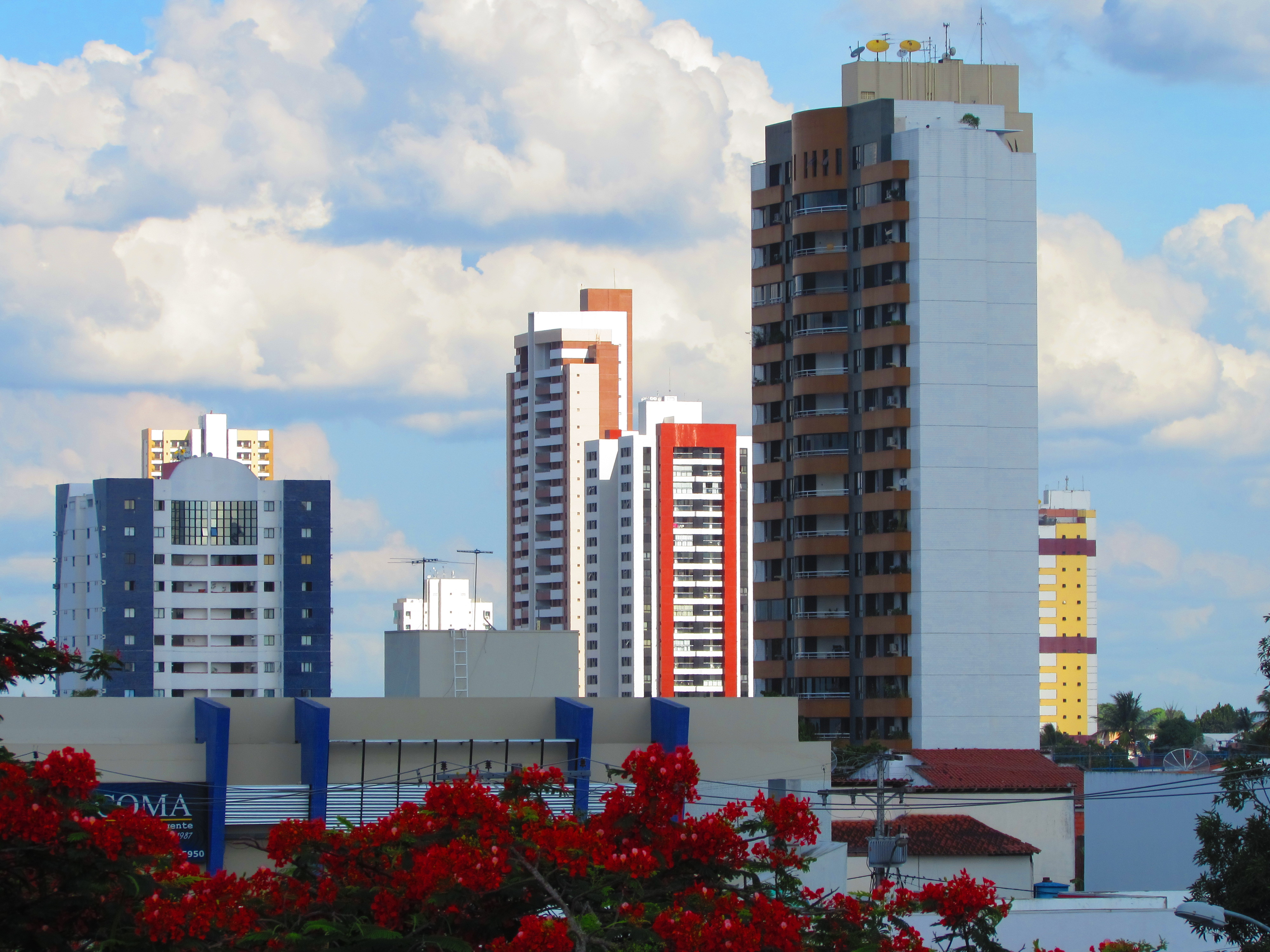 modernos predios no bairro santa monica